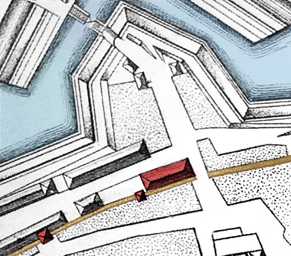 Plan von Hannover mit dem rot eingfärbten Armen- und Waisenhaus (Herberge des Herrn), Stadtmauer braun eingefärbt, Stadtmauertürme rot eingefärbt, Festungsgraben blau eingefärbt. (Nachträgliche Kolorierung)